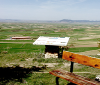 Fotografía Comarca del Jiloca